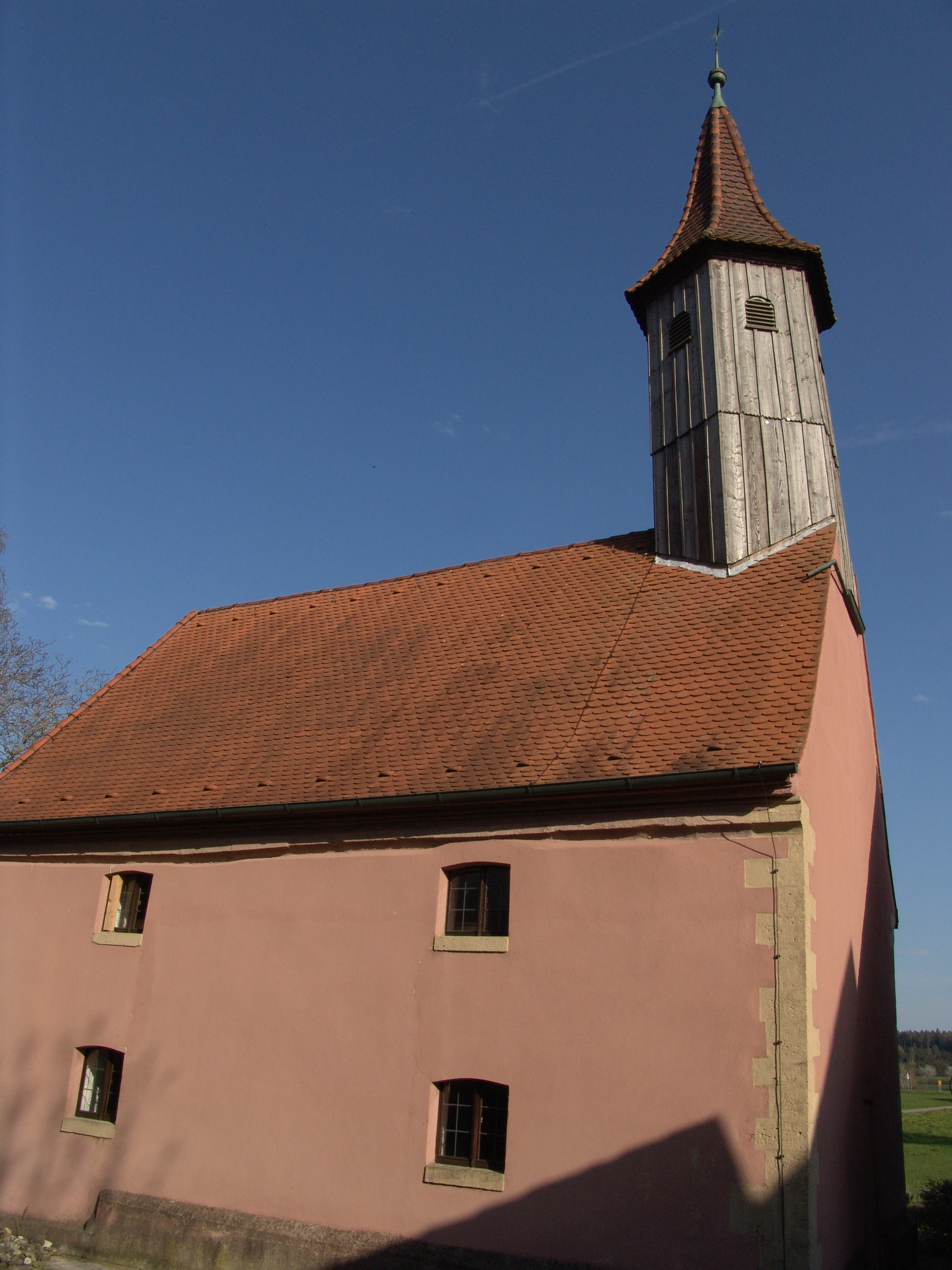 evang.-luth. Kirche St. Wolfgang in Haundorf